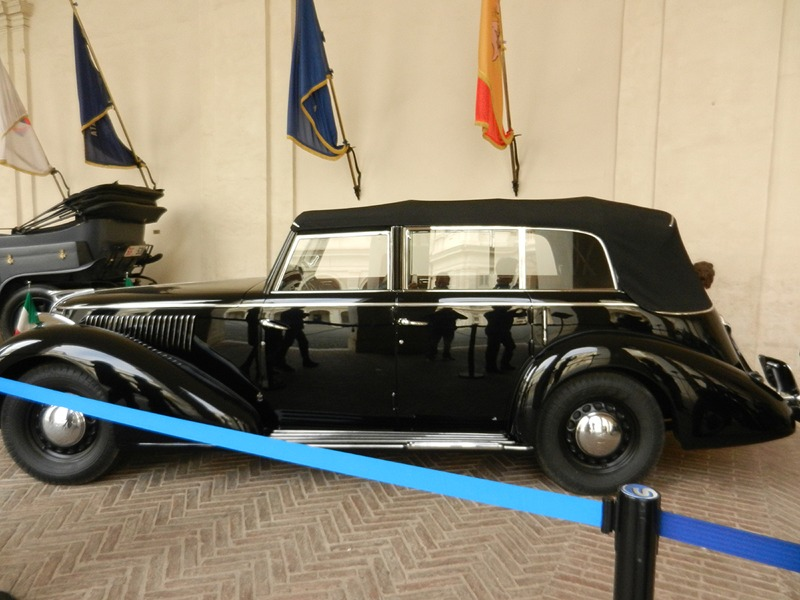 Fiat 2800 Presidenziale in mostra nel cortile del Palazzo del Quirinale a Roma